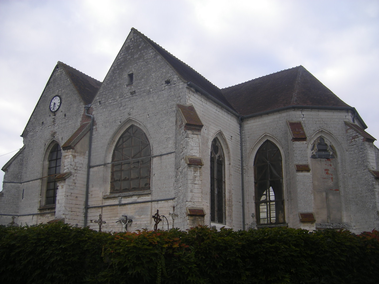 Salon